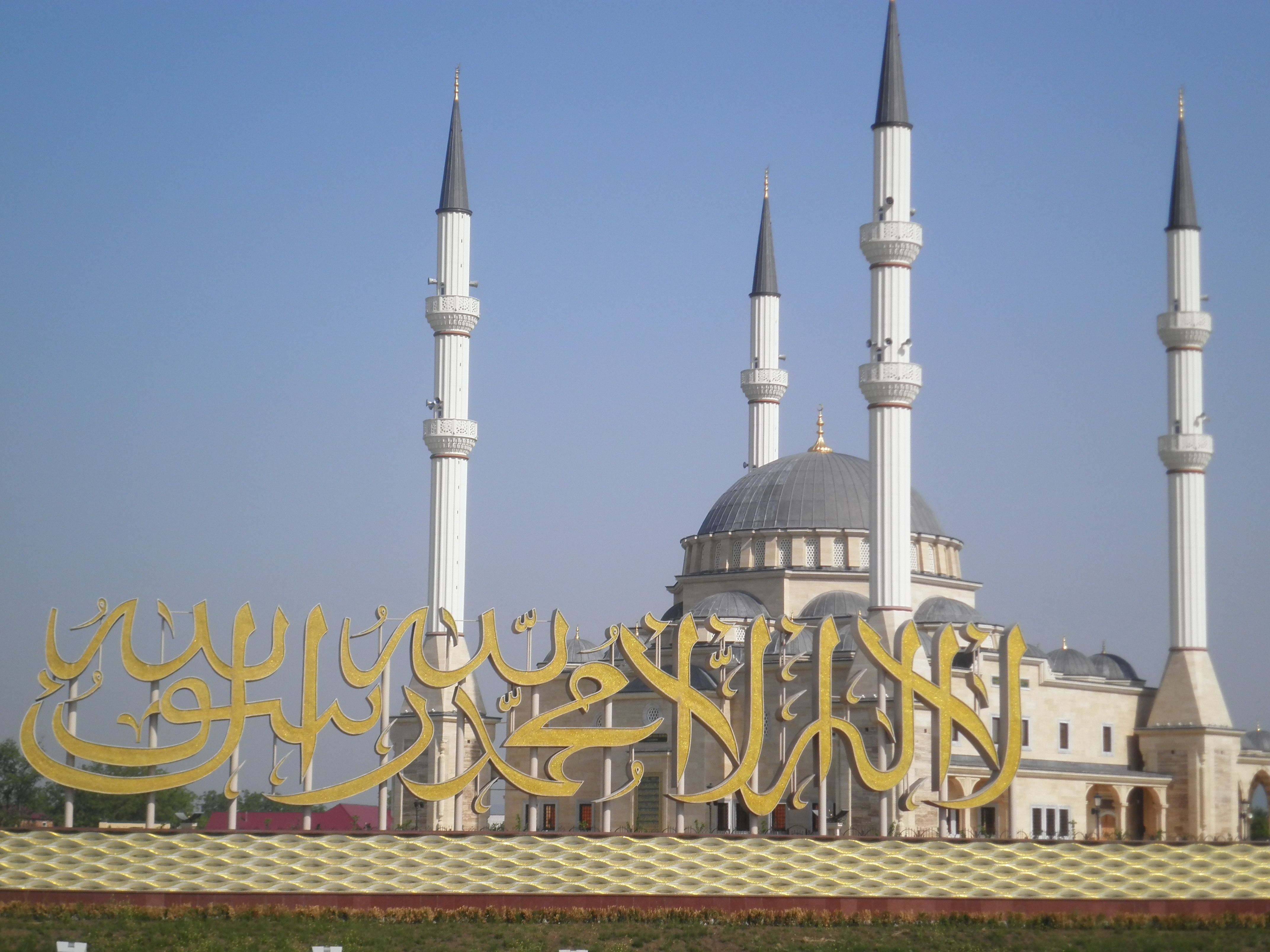 Мечеть в Джалке